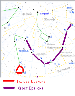 Сделано с помощью графического редактора Pain